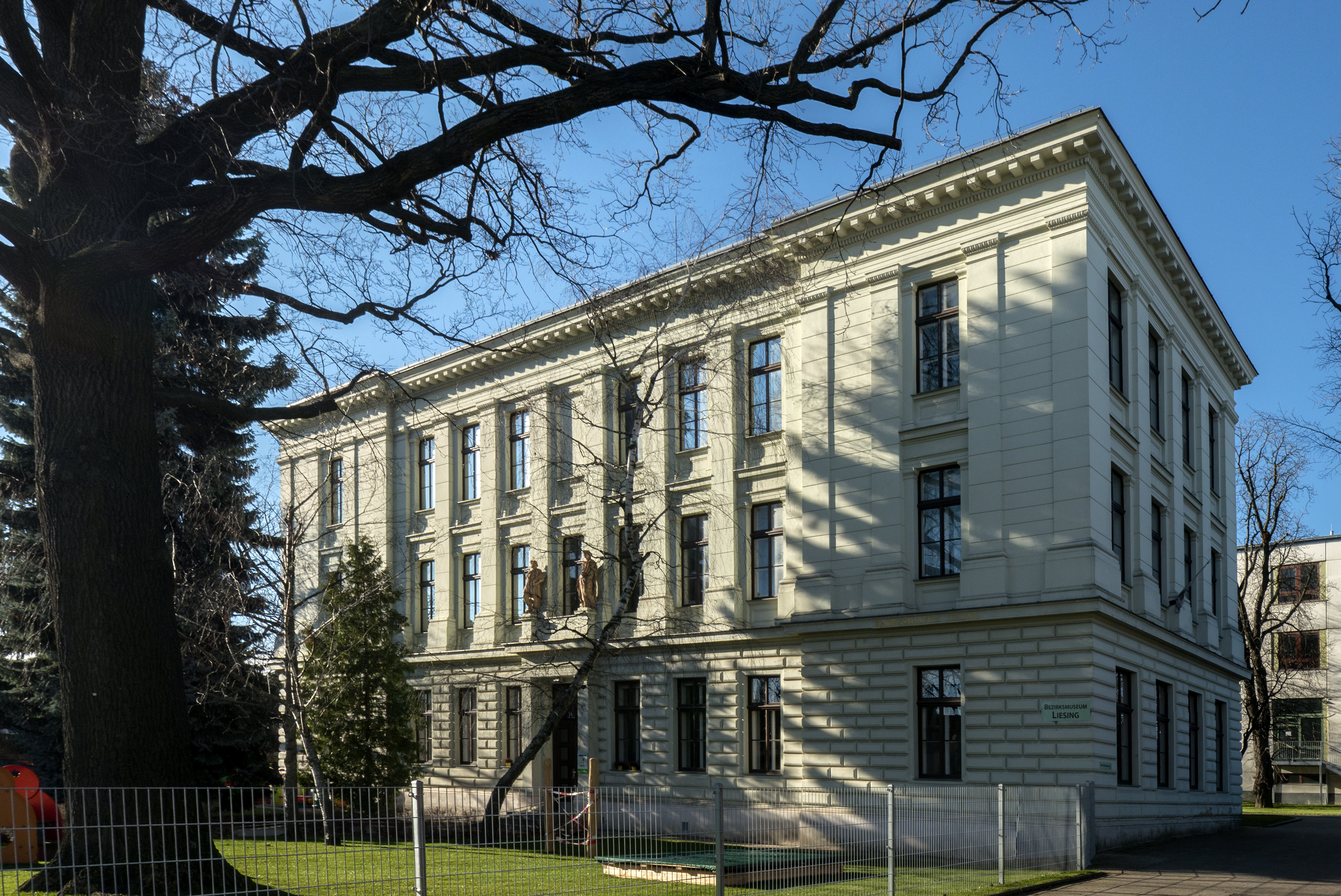 Bezirksmuseum Liesing, Kindergarten (ehem. Schule)